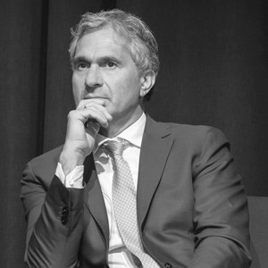 Luca Valerio Camerano (Roma, 20 settembre 1963) è un dirigente d’azienda italiano, Amministratore Delegato e Direttore Generale di A2A S.p.A.